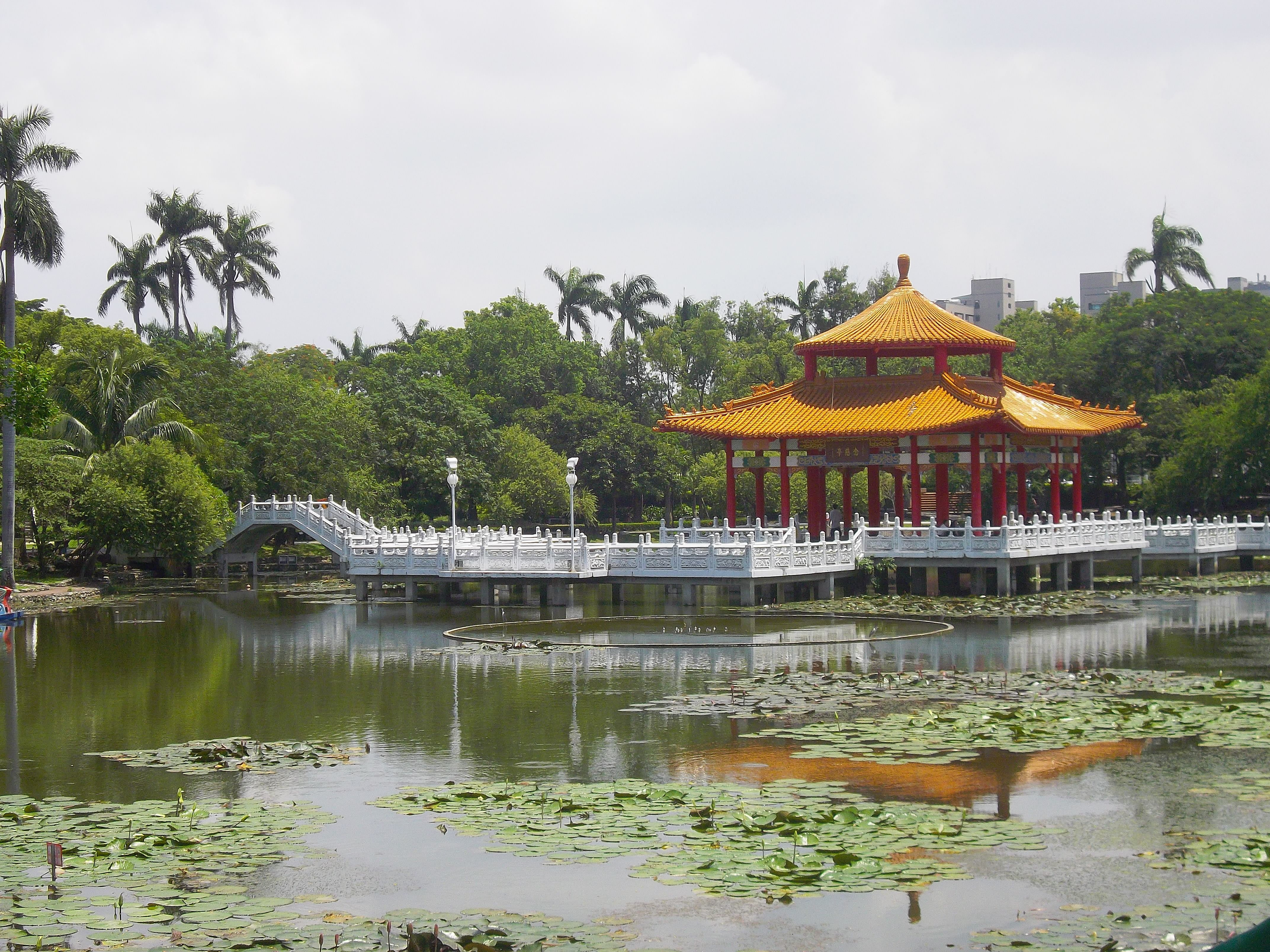 臺南公園 燕潭 念慈亭